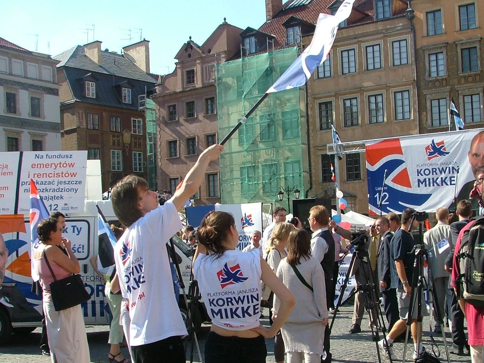 Platforma Janusza Korwin-Mikke, wybory 2005